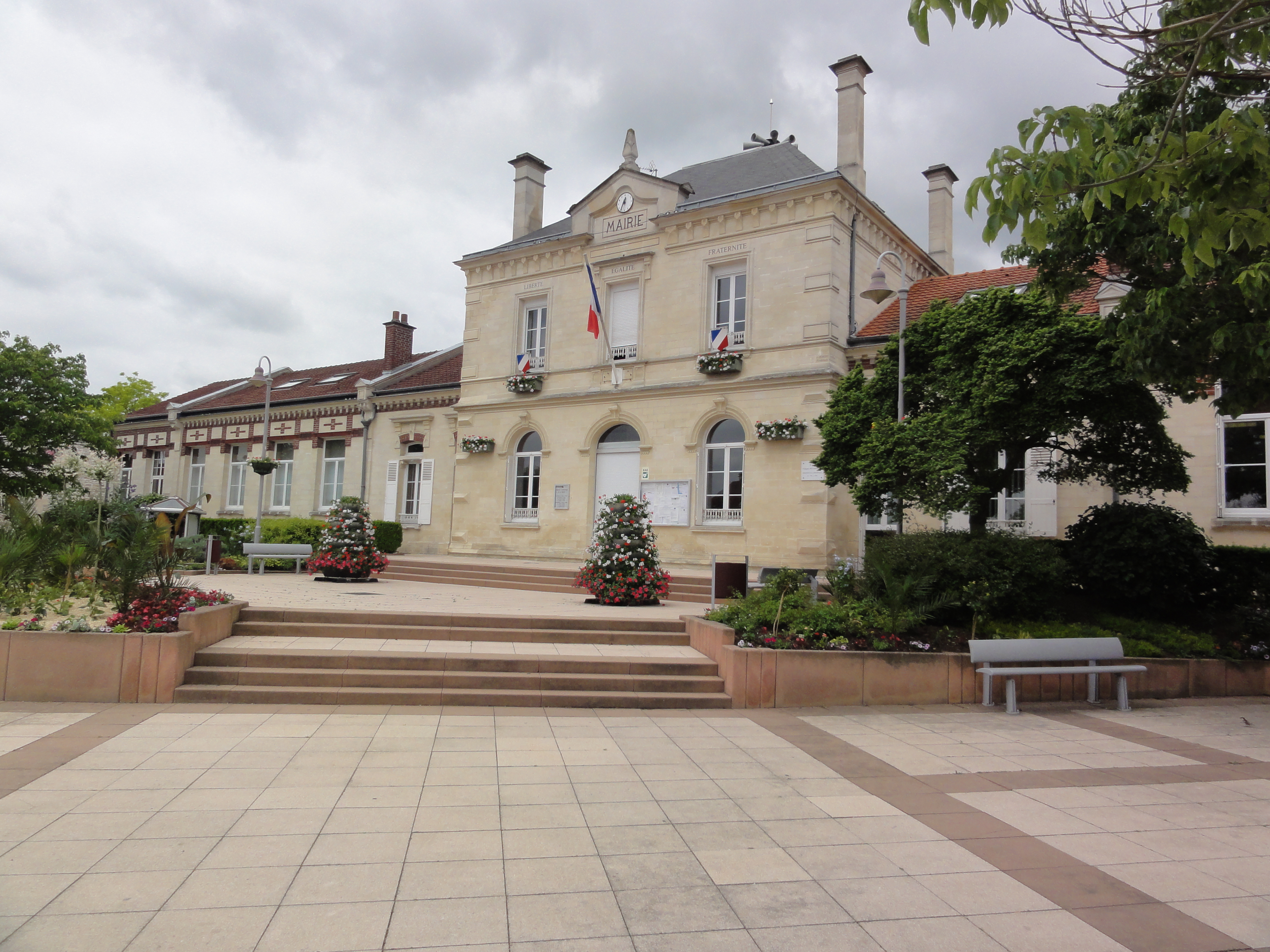 Villers-Saint-Paul (Oise) Mairie